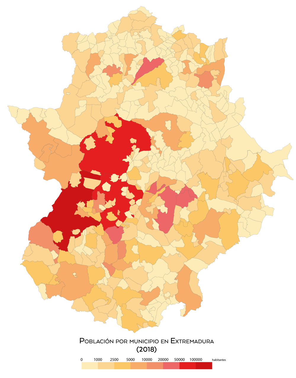 Población por municipio en Extremadura en 2018